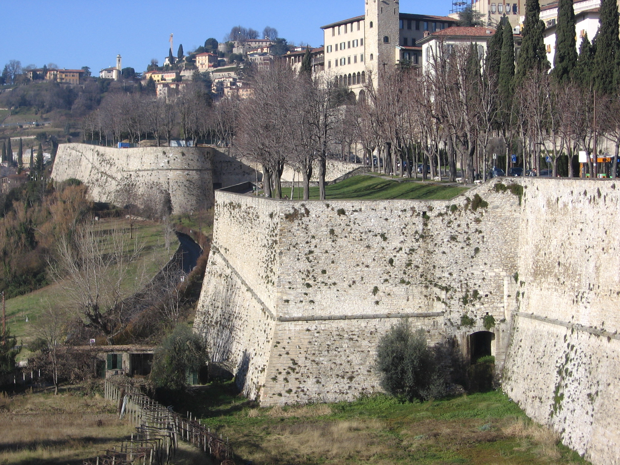 Lato Sud-Ovest delle mura Venete (Piattaforma di Santa Grata e baluardo di San Giovanni), Bergamo, Italy